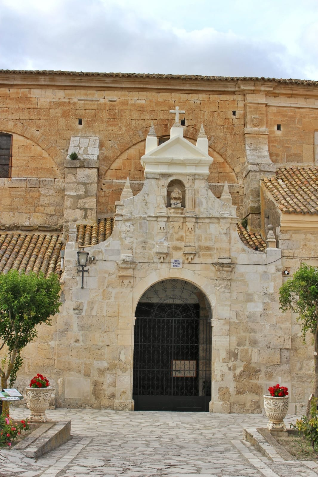 Entrada de la Ermita de Nuestra Señora de Revilla